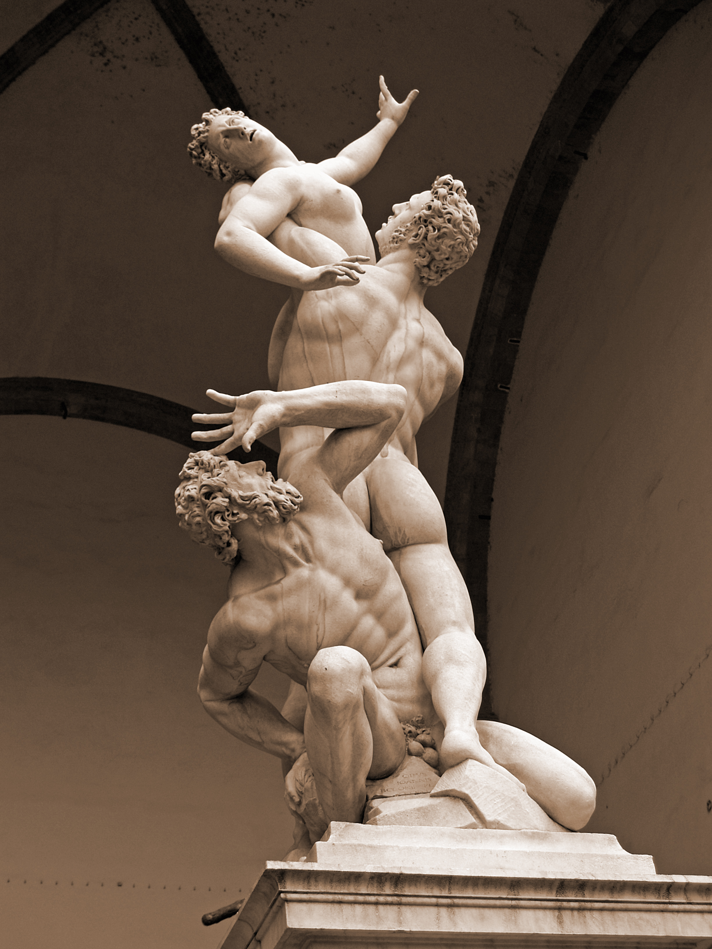 Statue Rape of the Sabine Women by Giambologna in Florence, Loggia dei Lanzi, seen from the Piazza della Signoria